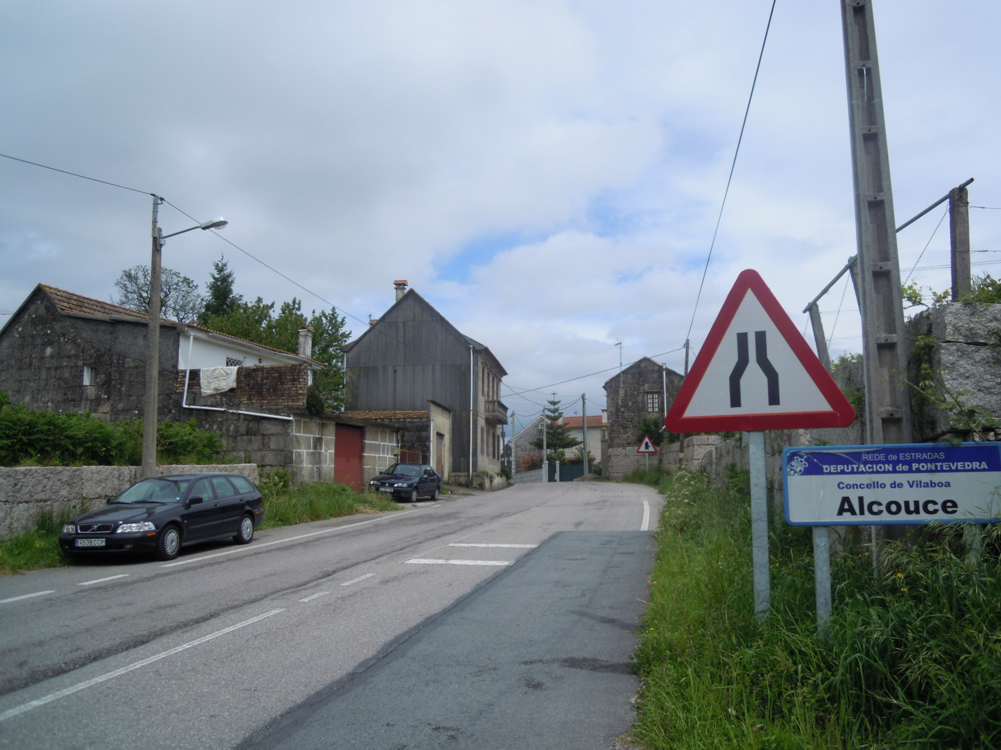 Entrada na aldea do Alcouce desde a estrada PO-0002